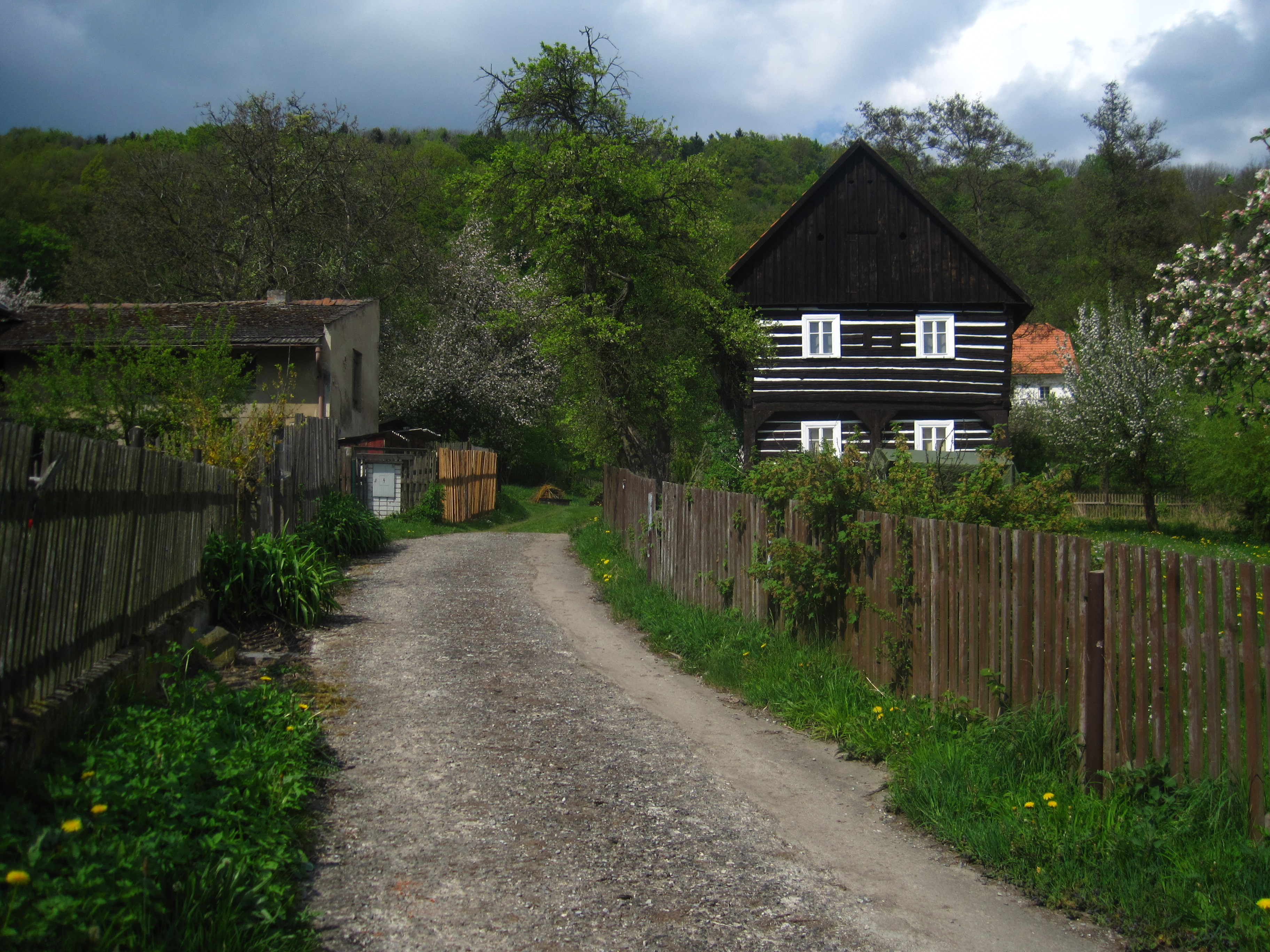 Rané - horní část vsi s chalupou čp. 26